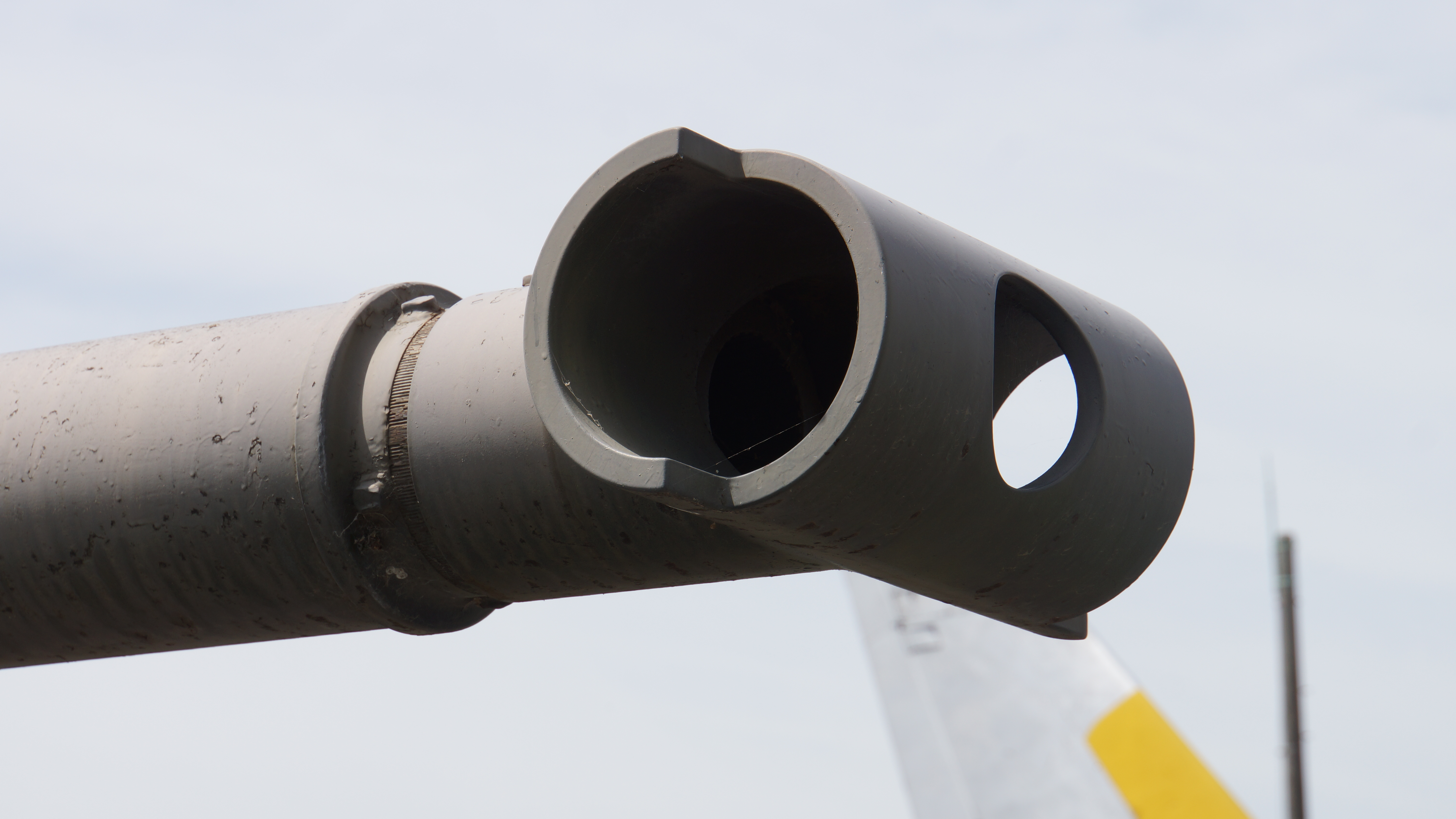 陸上自衛隊 61式戦車 T字型マズルブレーキ。 2016年5月8日 大津駐屯地にて。